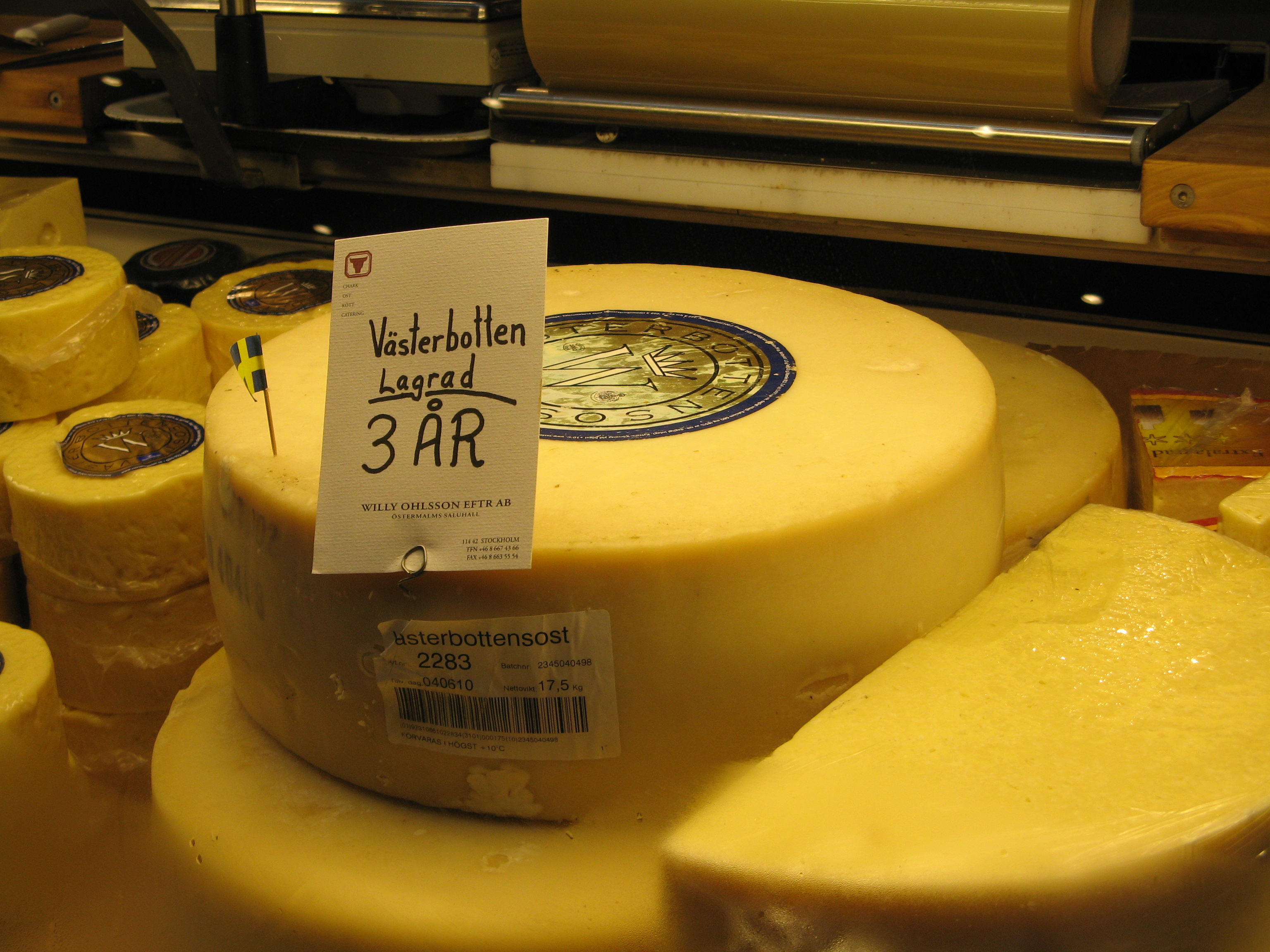 Västerbotten ost, Sweden.